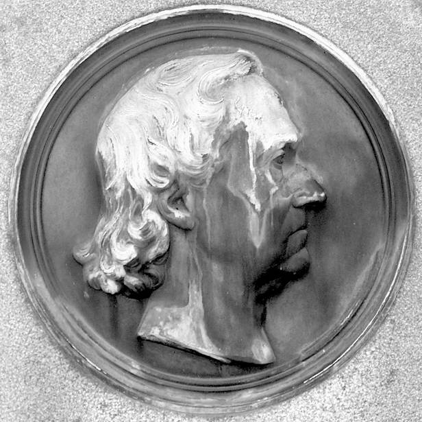 Grabstein Mörike Stuttgart 2004 Image by Benutzer:Enslin, released under GFDL Upload to de.wikipedia: 19:56, September 8, 2004